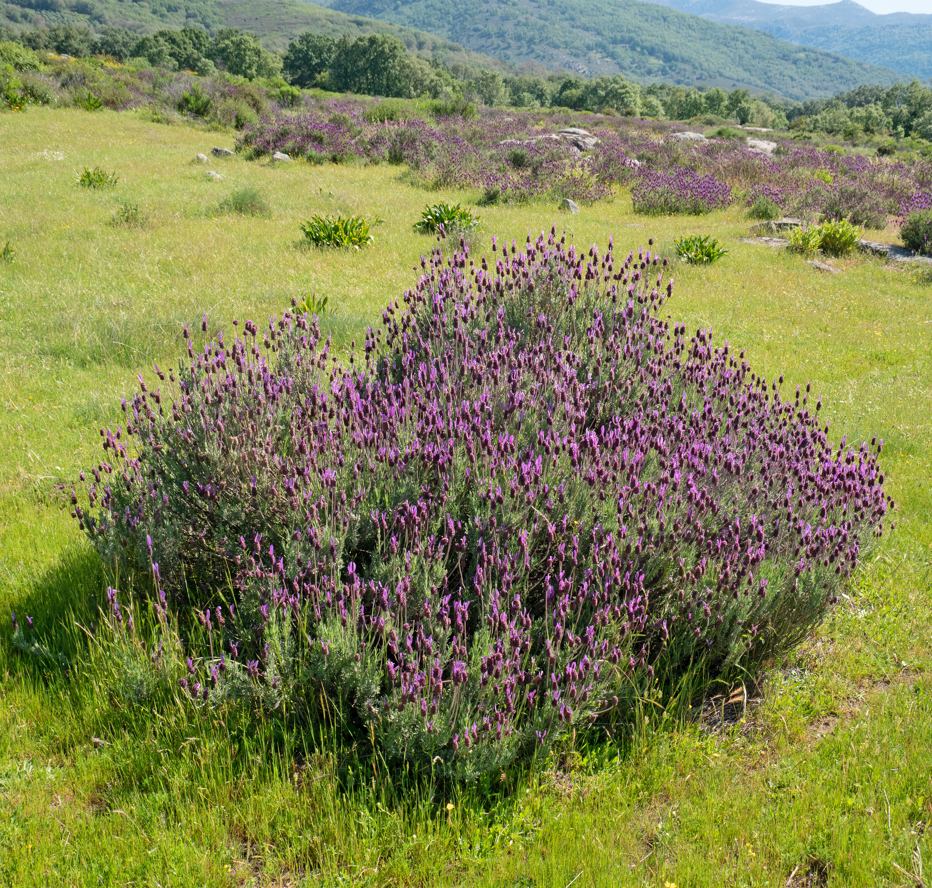 Lavandula pedunculata. Losar de la Vera (Cáceres, España).